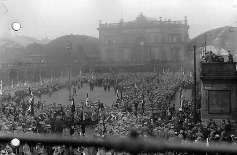 Magdeburg. Der Frontkämpfertag in Magdeburg, der unter Beteiligung tausender von Frontkämpfern dortselbst stattfand. Blick auf den Bahnhofsplatz in Magdeburg mit den darauf versammelten Frontkämpfern.